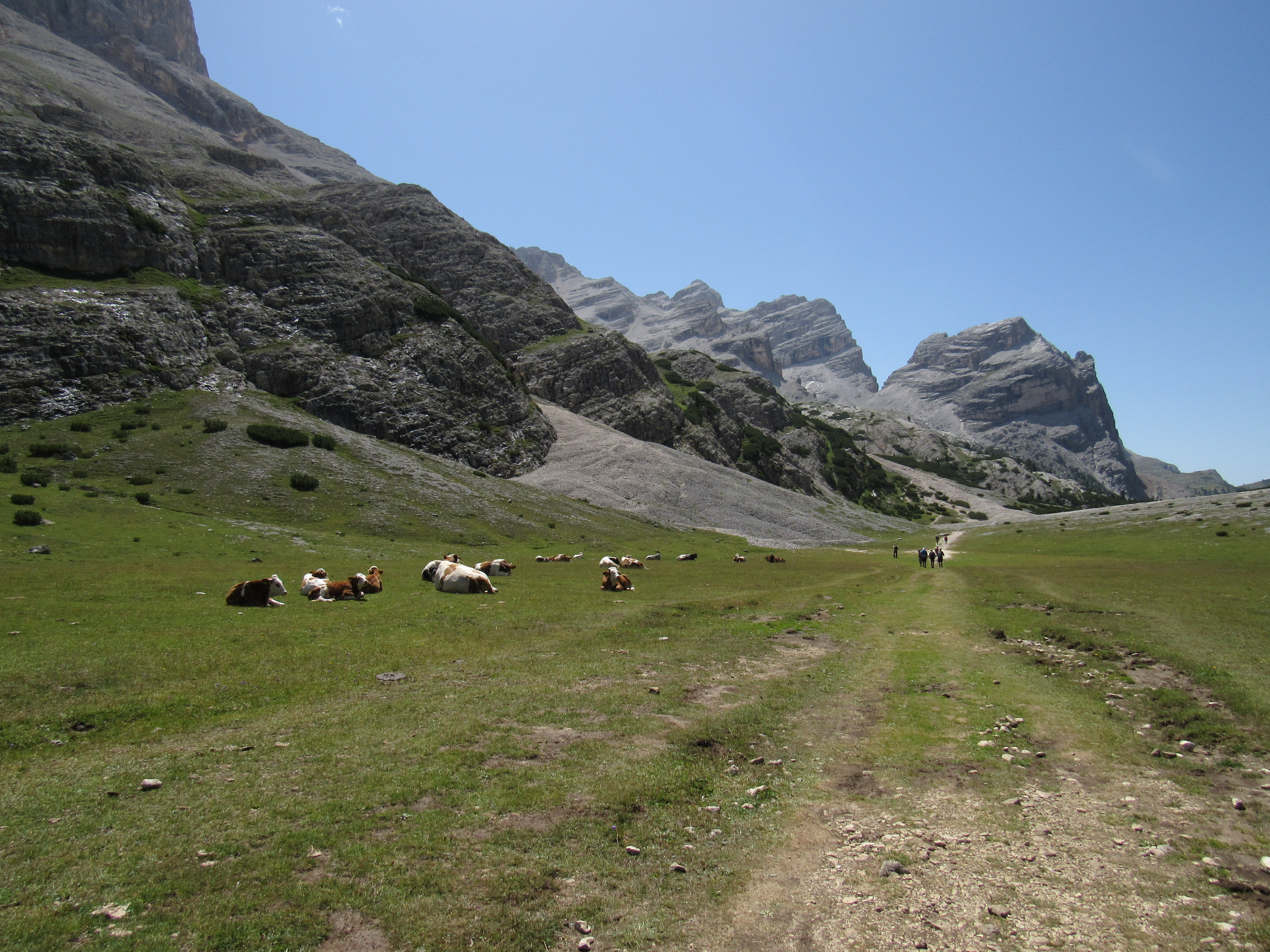 Parco naturale Fanes - Sennes - Braies (Q740279)